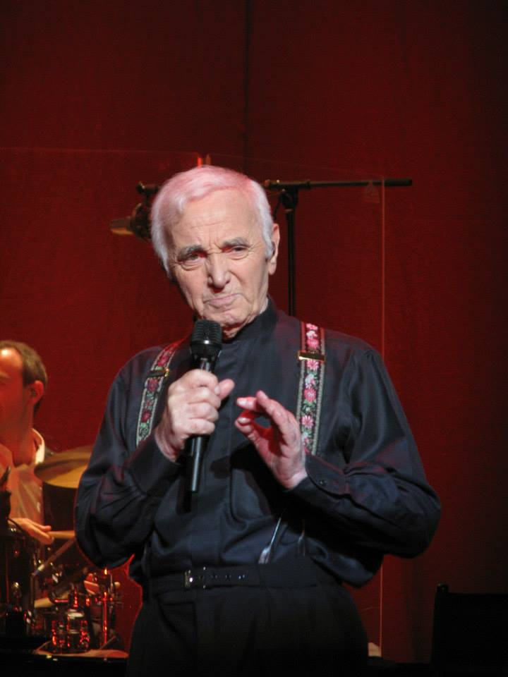 Charles Aznavour (b. May 22, 1924) – French singer